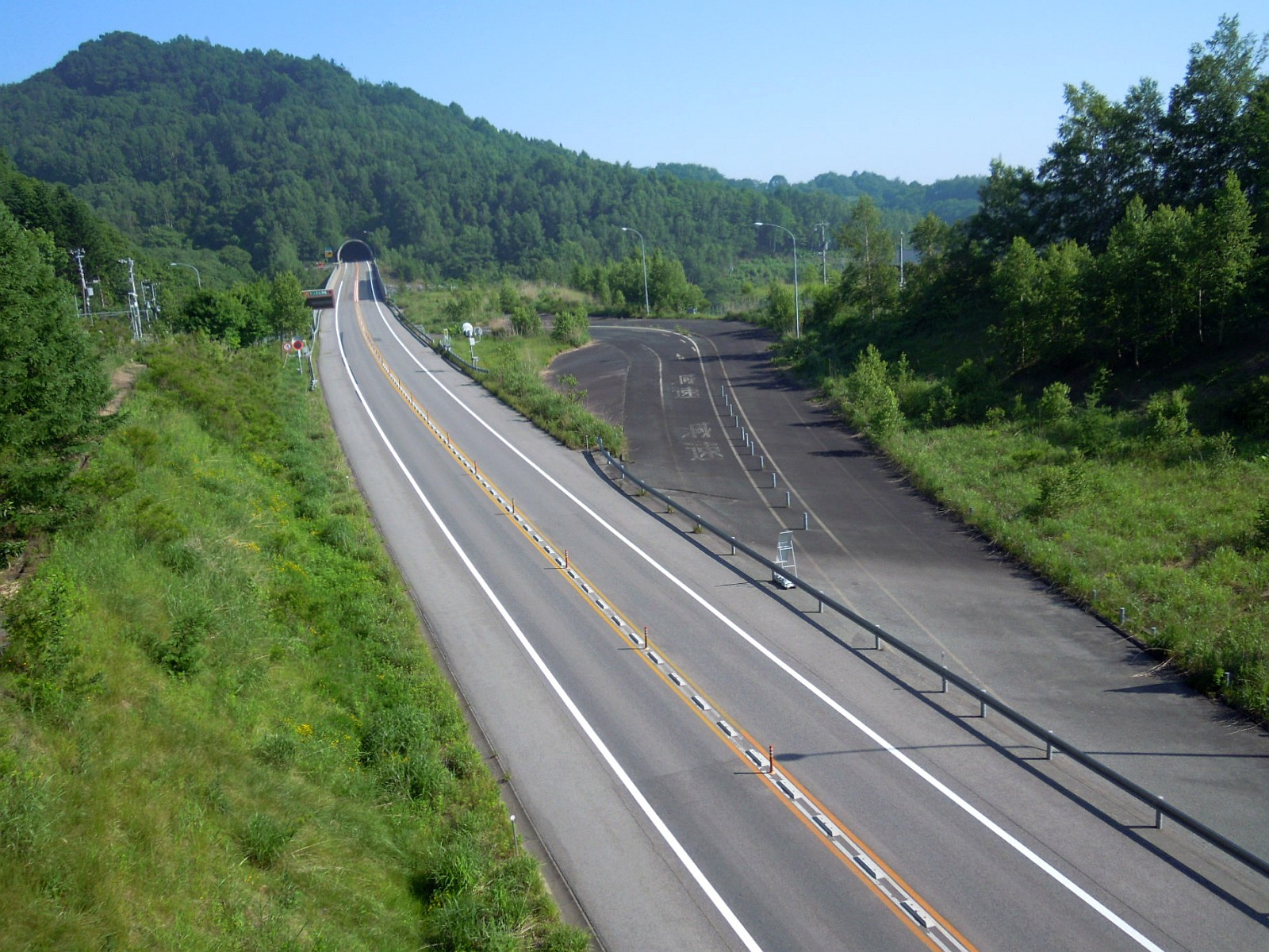 北海道虻田郡豊浦町にある道央自動車道虻田洞爺湖仮出入口の跡地を函館側から。